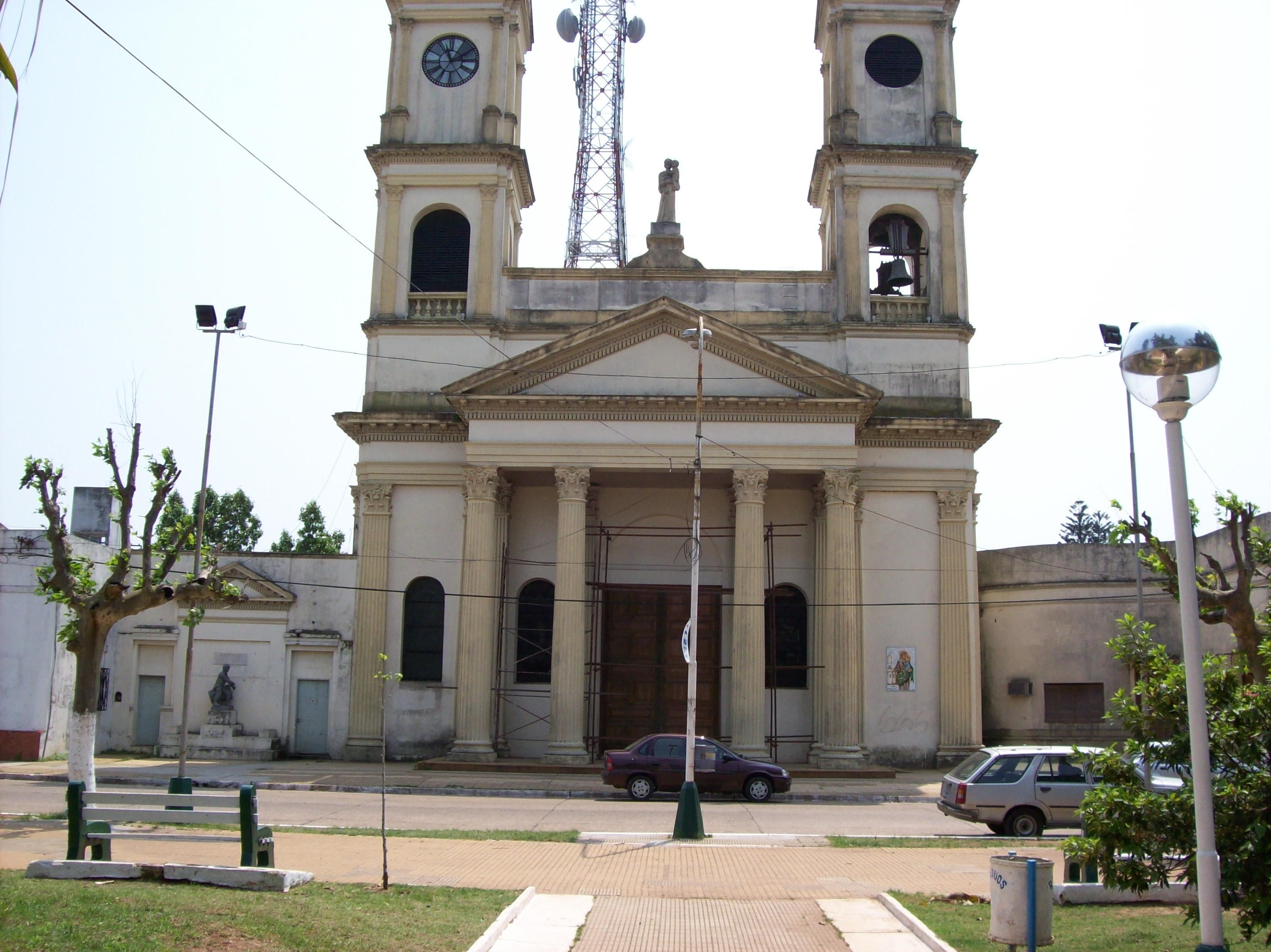 Iglesia San José, frente a la plaza Independencia; en Paso de los Libres, Provincia de Corrientes, Argentina